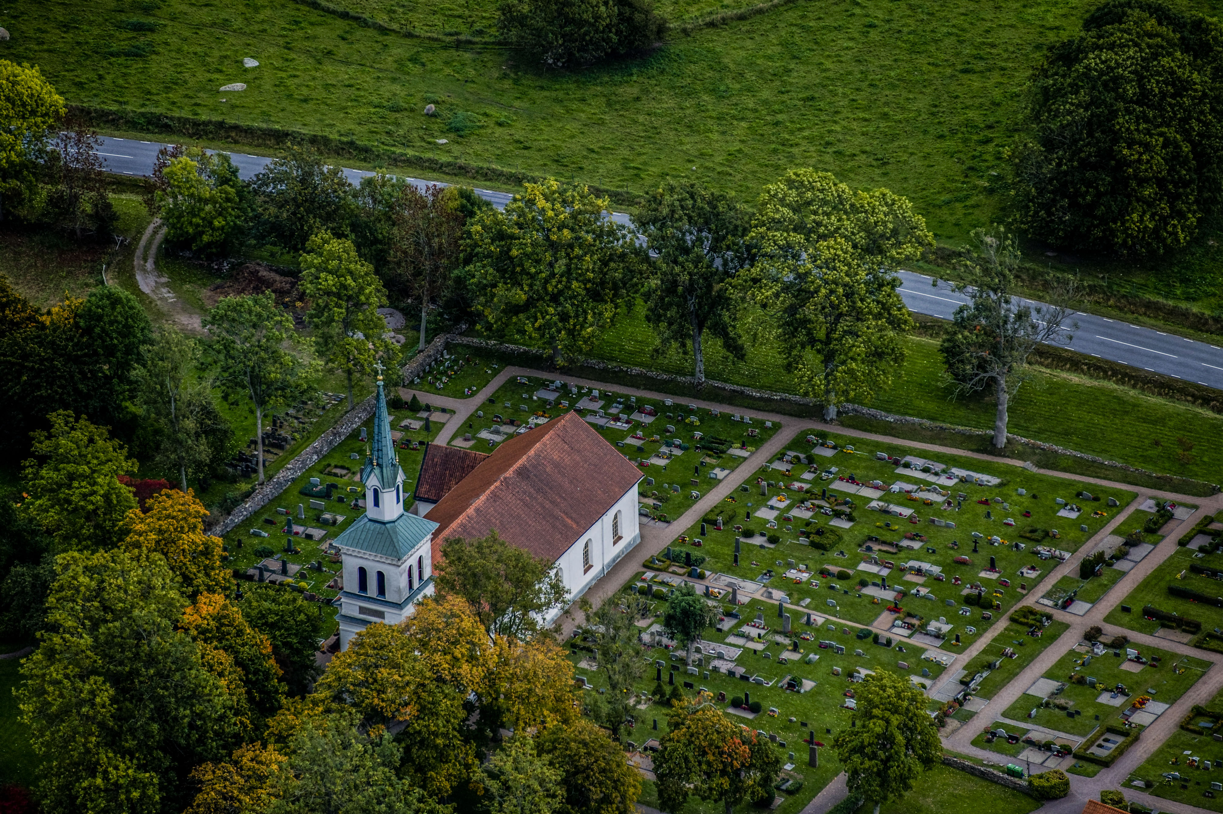 Listerby kyrka från luften